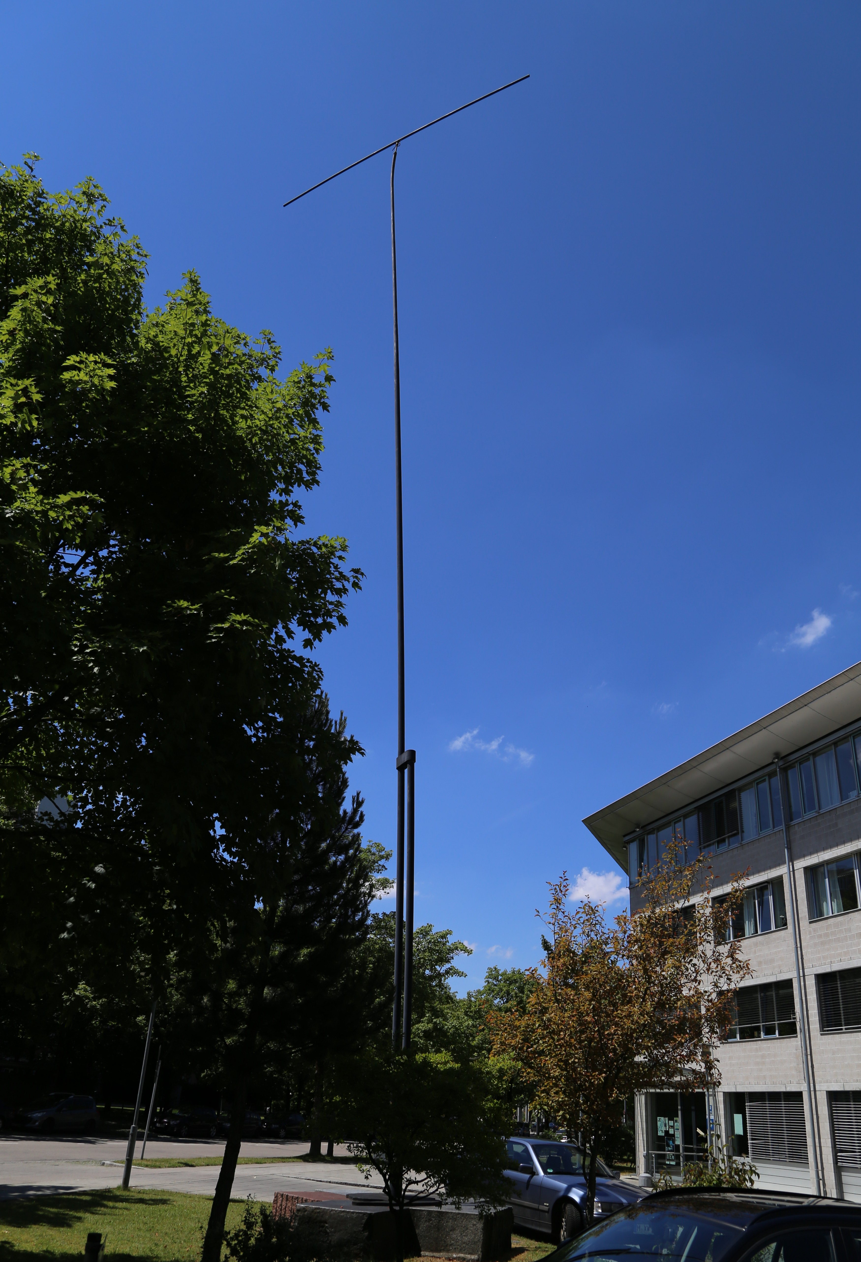 Paul Fuchs: Inklination - frei schwingende Nadel (1999), Adenauerring 31, Neuperlach, München